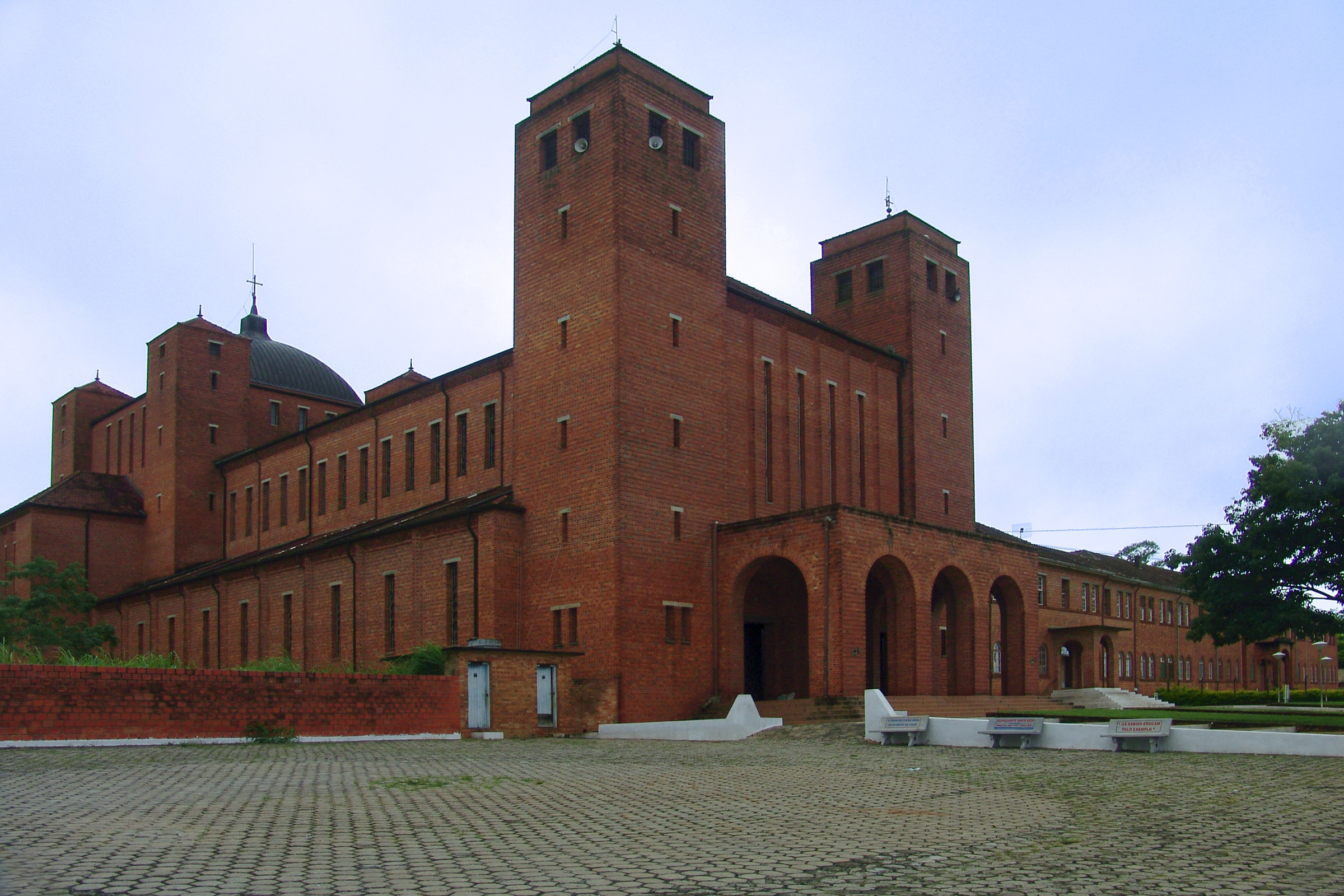 Abadia (e igreja) Cisterciense de Nossa Senhora da Santa Cruz de Itaporanga, São Paulo, Brasil